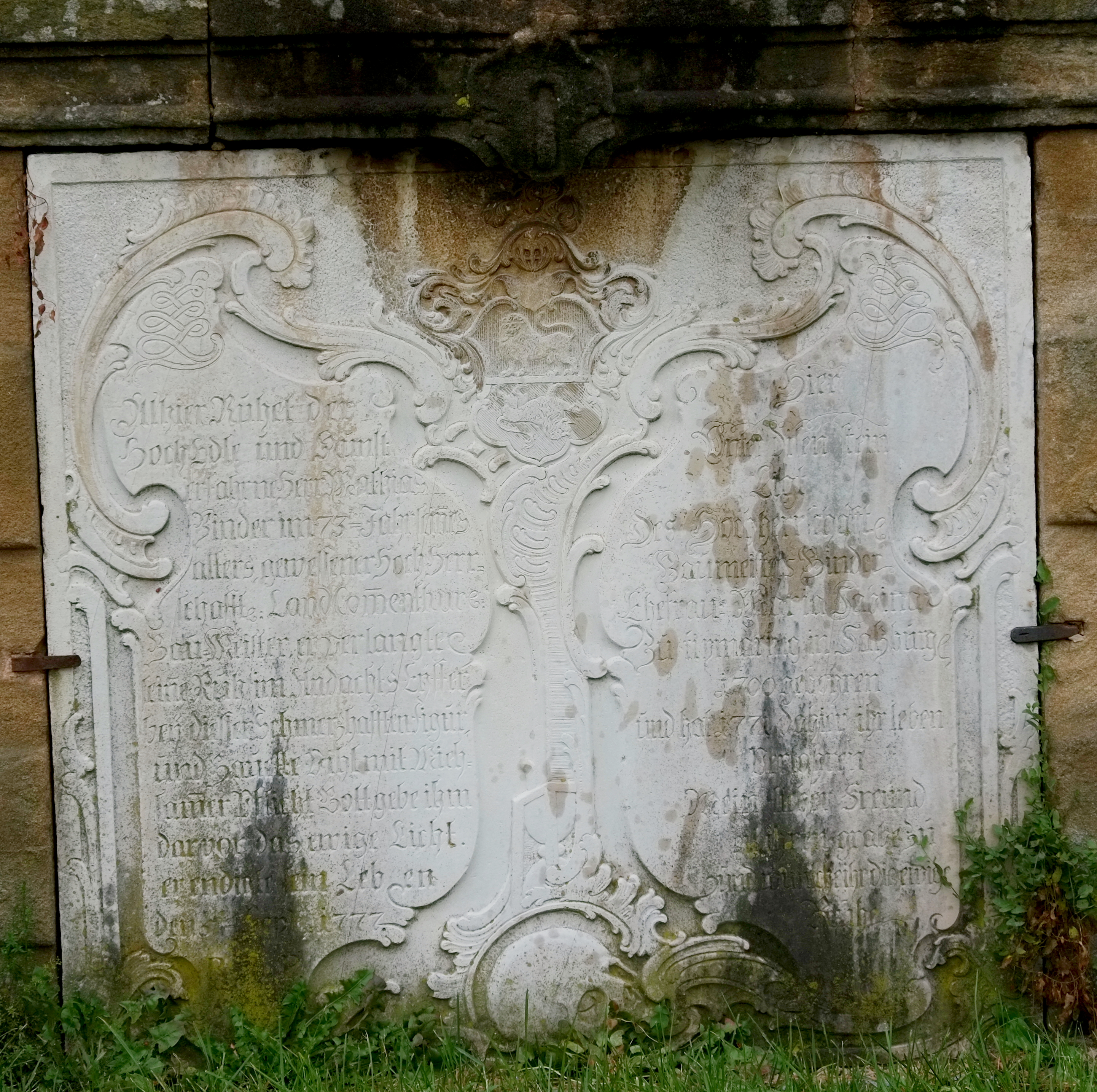 Grabstein für Matthias Binder auf dem alten Friedhof an der Kirche St. Georg in Ellingen im Landkreis Weißenburg-Gunzenhausen (Bayern)